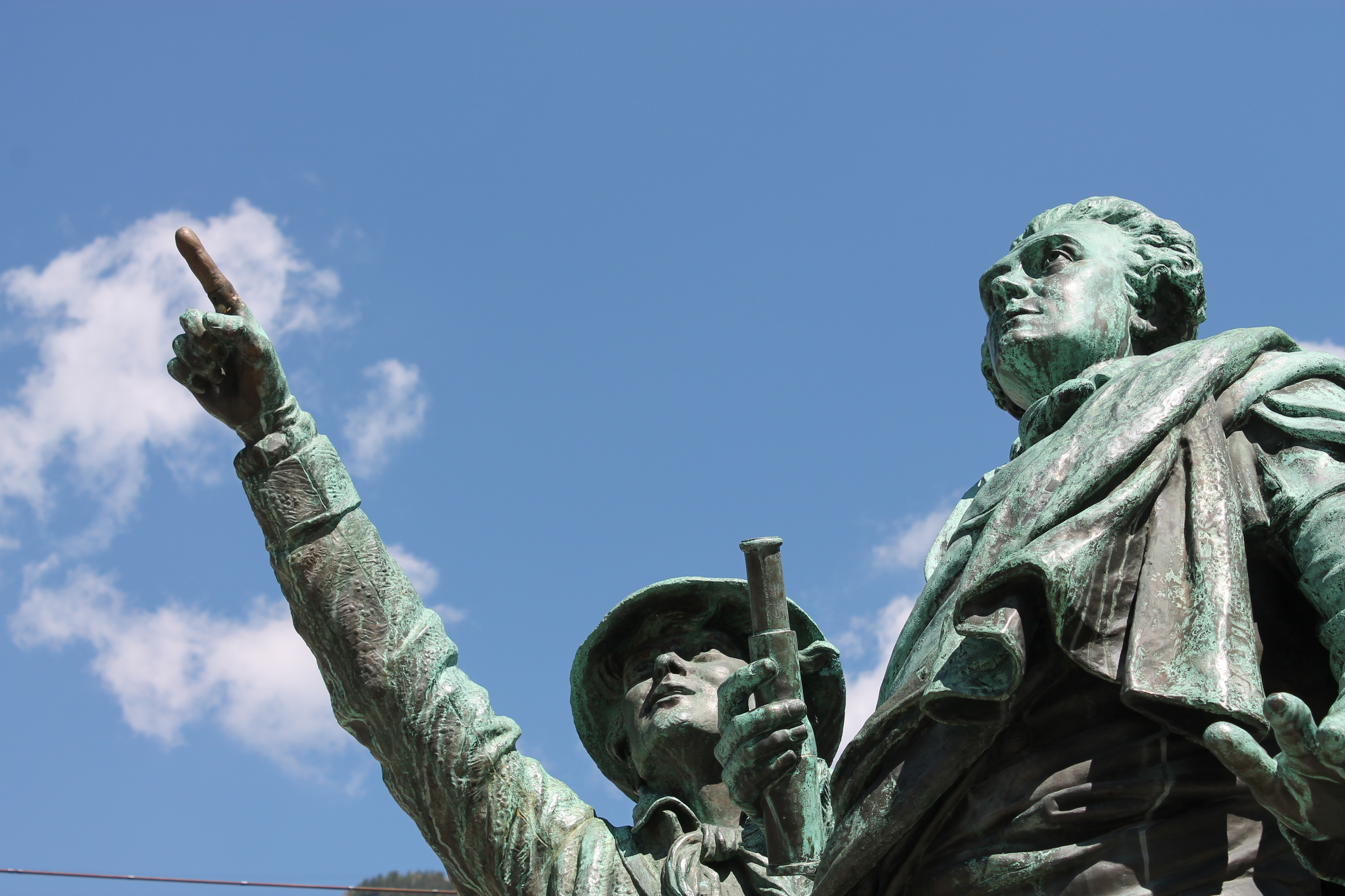 Détails du groupe en bronze représentant Horace de Saussure et son guide Jacques Balmat, sculpture Jean-Jules Salmson (1887) Further information